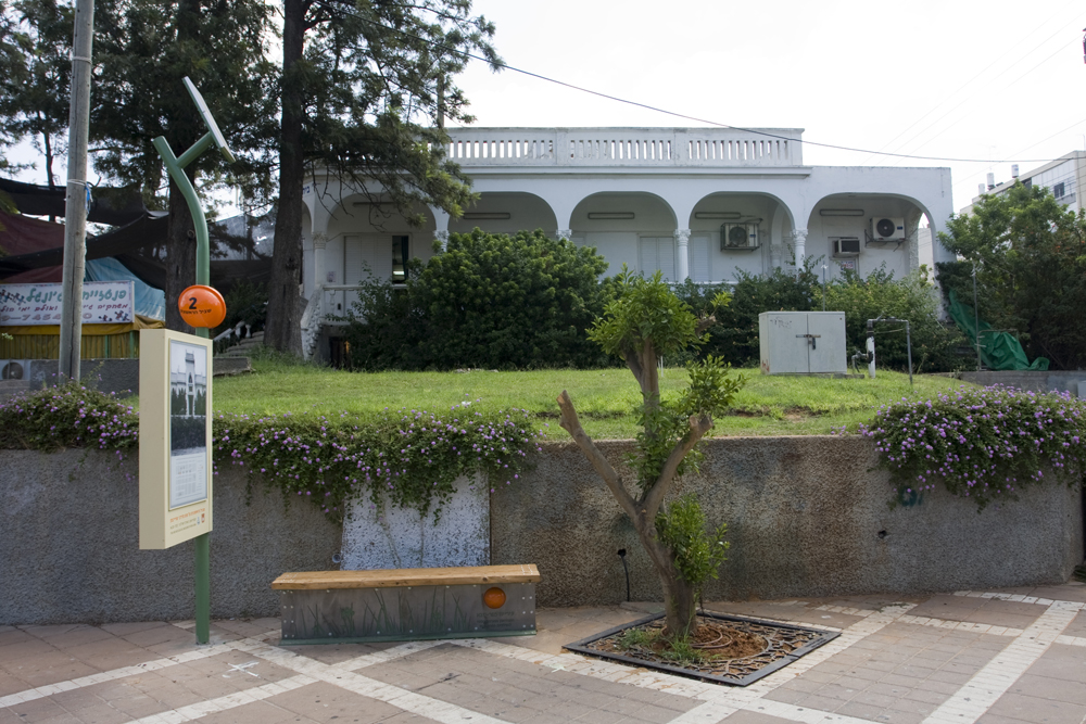 בית המגורים נבנה על ידי משפחת אהרונוביץ' בשנת 1928 בסגנון אקלקטי. בשל פארו הרב כונה "הארמון".